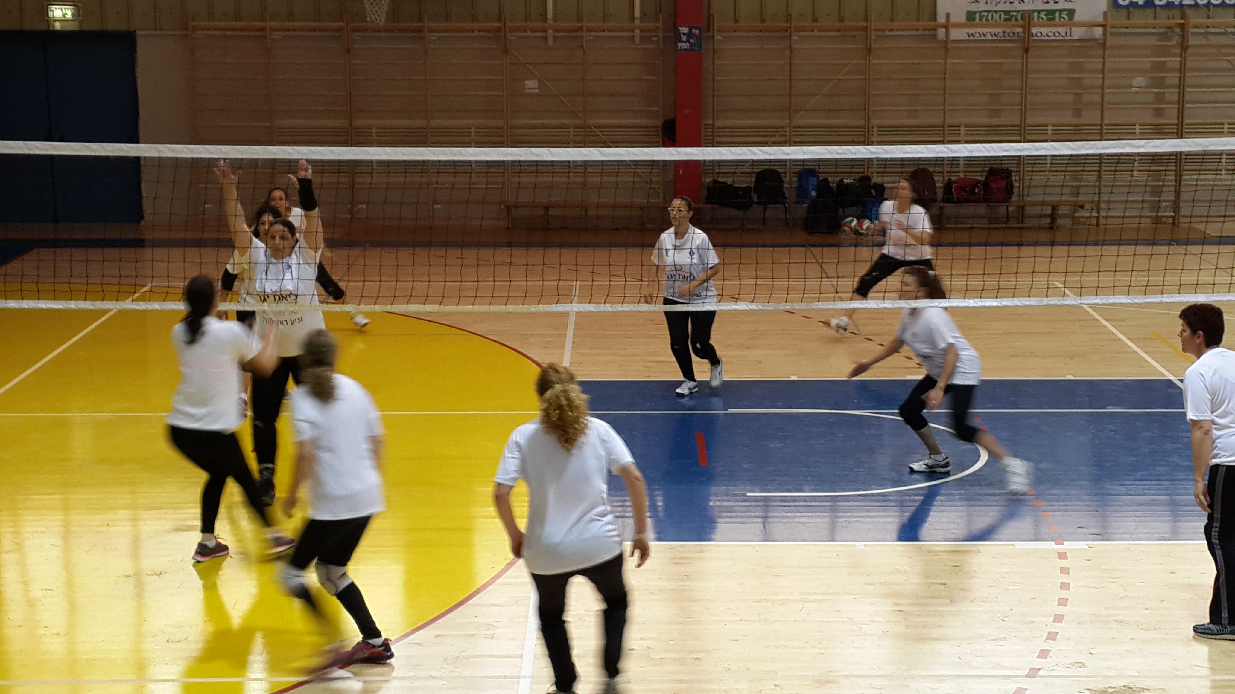 כדורשת-קבוצת לביאות קרית אתא בטורניר גביע ראש העיר קריית מוצקין